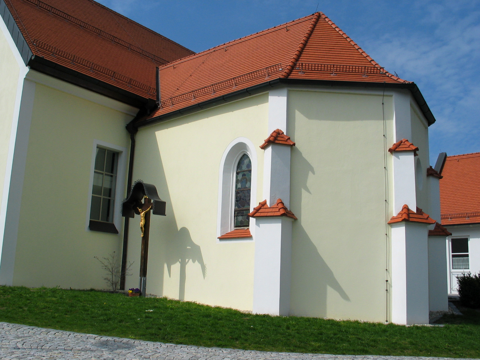 Niederhöcking, Kath. Pfarrkirche St. Martin. Alter Chor.